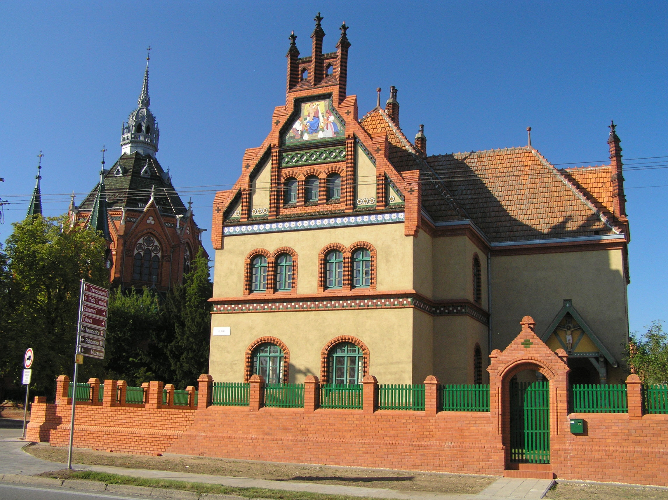 Fara v Poštorné